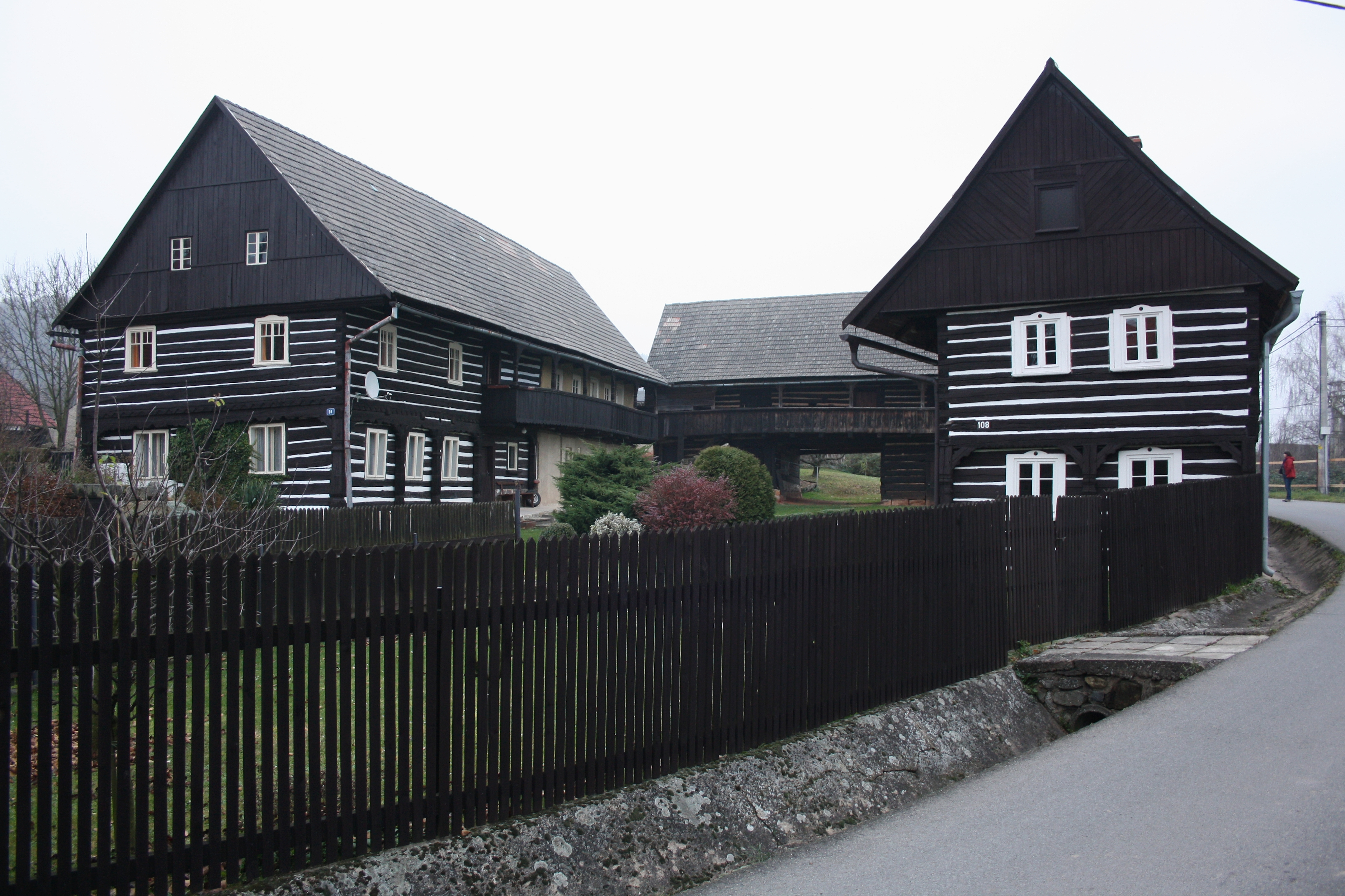 Chlum (okres Česká Lípa)